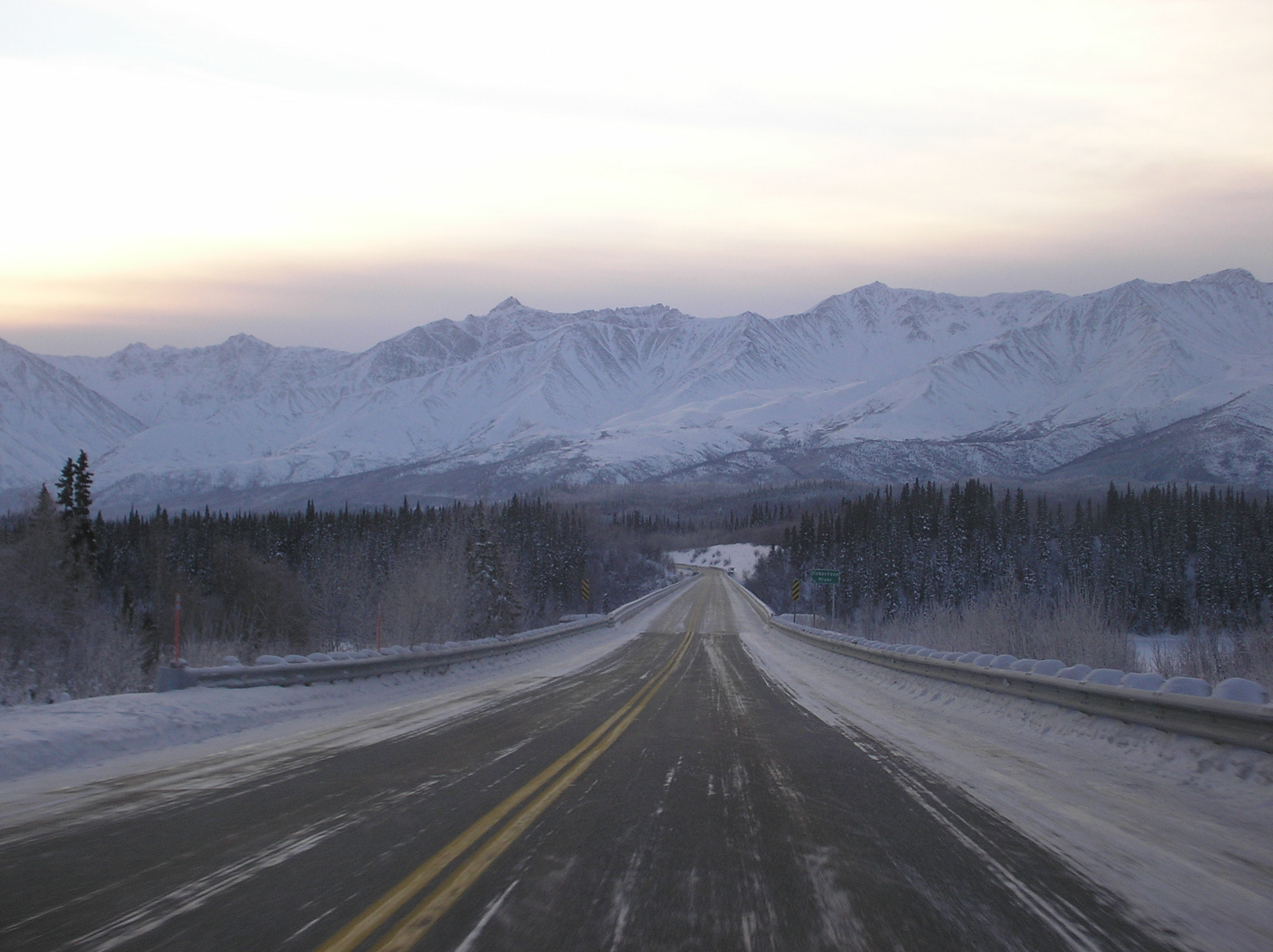 Alaska Highway